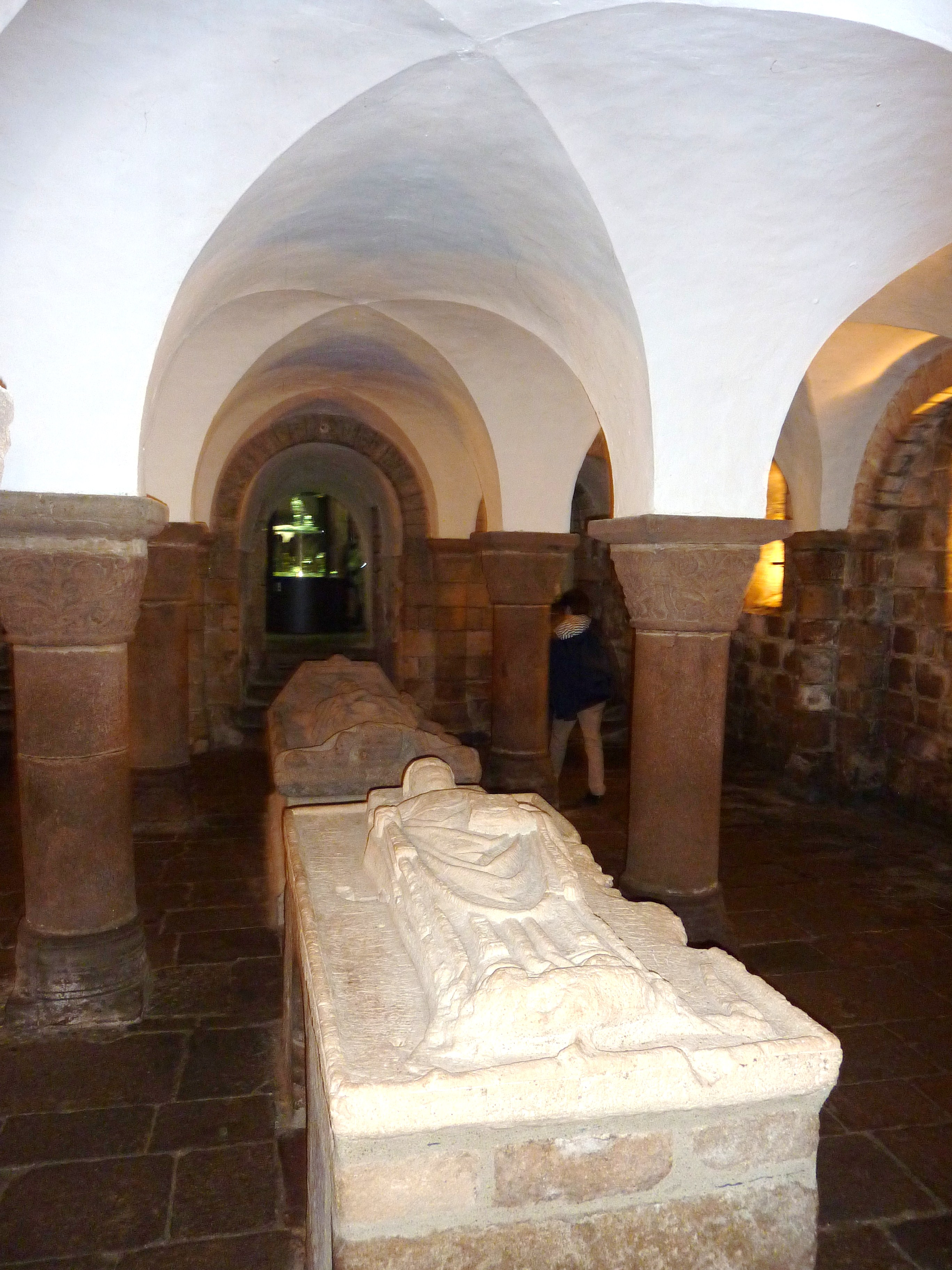 Quimperlé Eglise abbatiale Sainte-Croix La crypte avec ses deux gisants